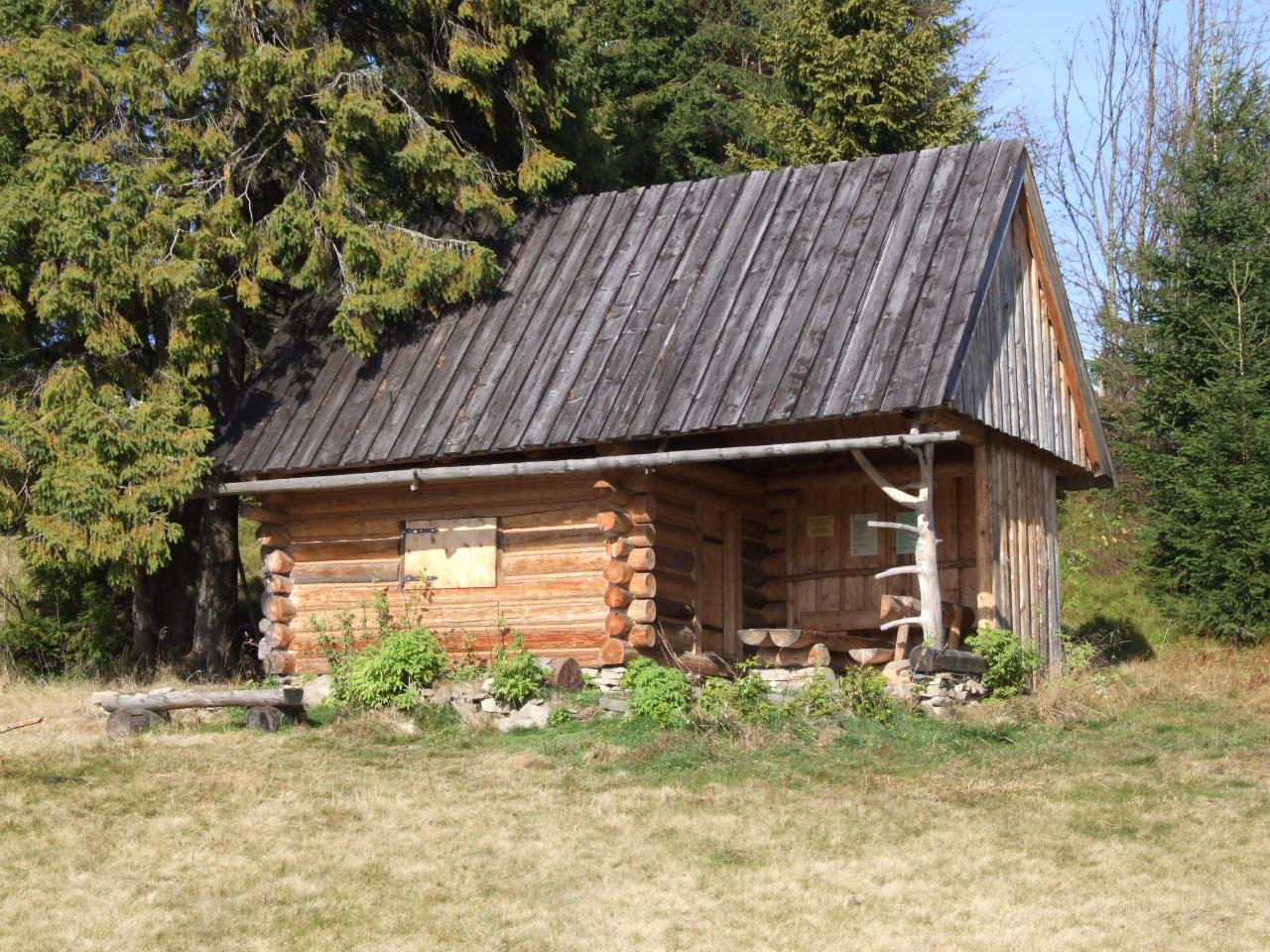 Szałas na polanie Jankówki w Gorcach